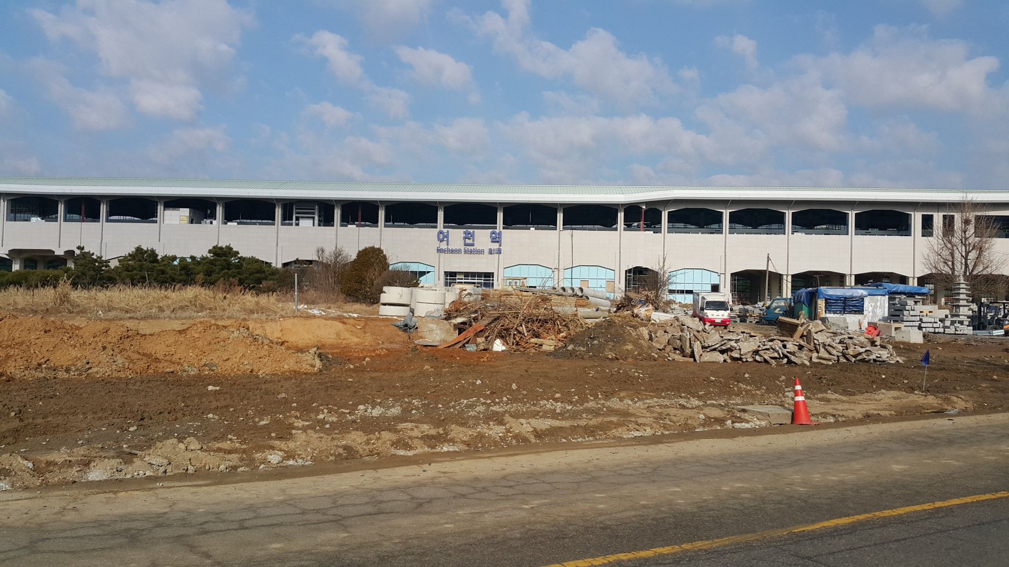 어천역 2020년 1월 3일